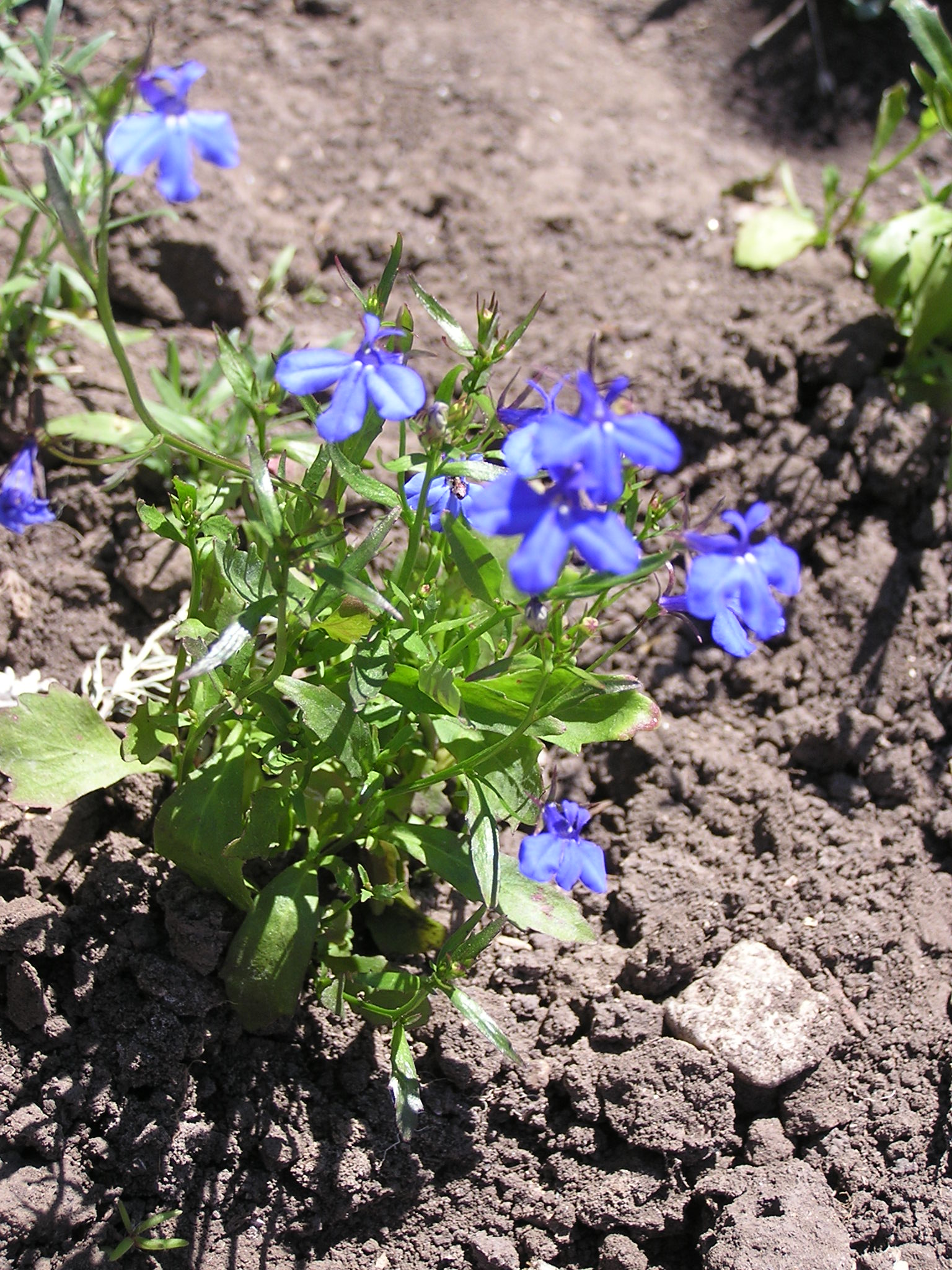 Растение в Седово.